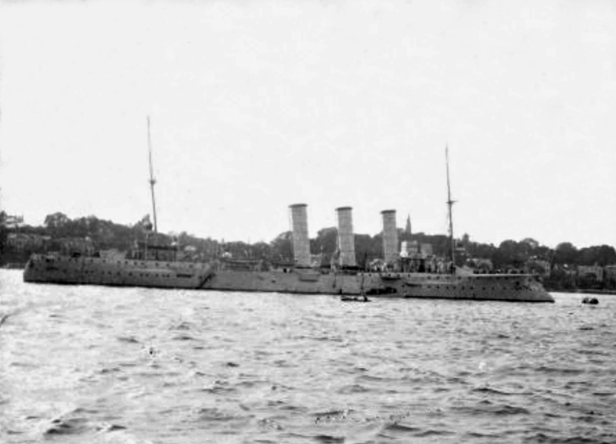 SMS München in der Kieler Förde.